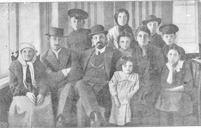 מנחם מנדל בייליס 1913 עם משפחתולאחר השחרור אוסף צחי יפהר גנזך המדינה